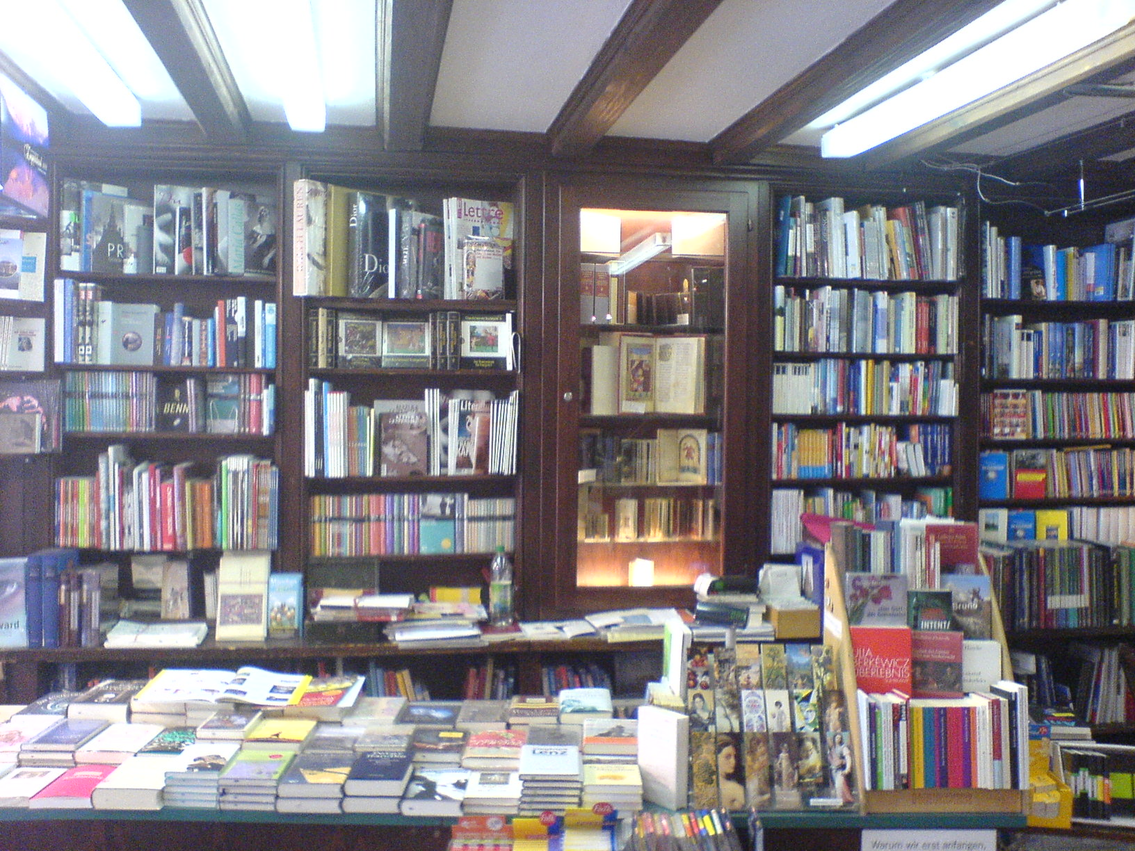 Kassentheke einer Buchhandlung mit Regalen und Auslage (Buchhandlung Lentner, Marienplatz 8, Eingang Weinstr.), München)